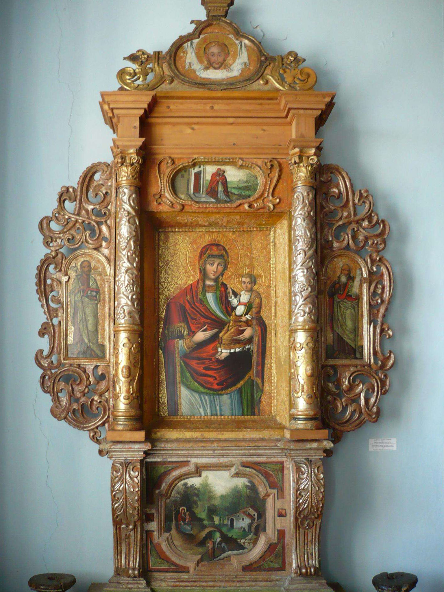 Ołtarz w zamku, w Olesku